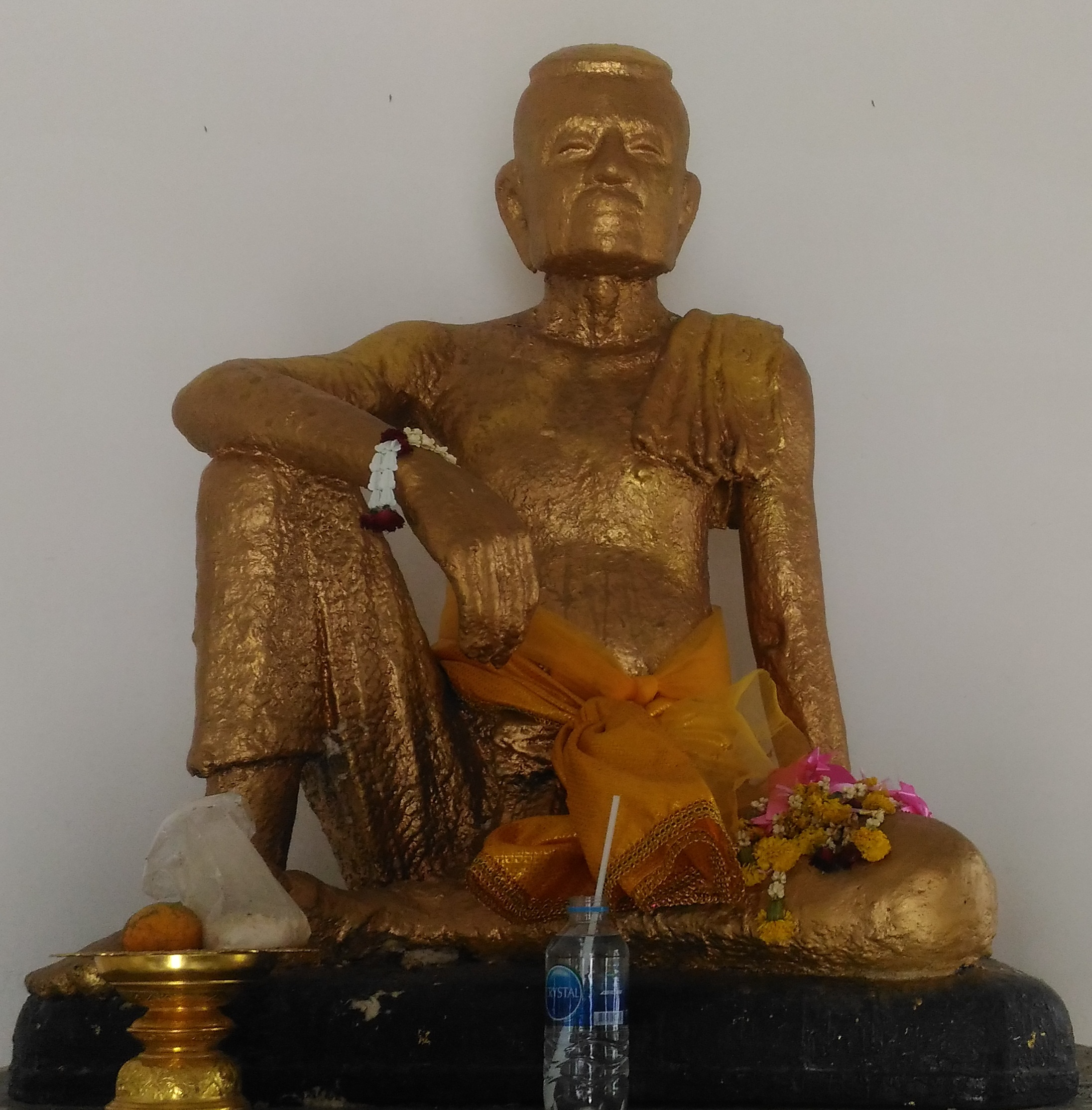 ศาลเจ้าพระยาบดินทรเดชา (สิงห์ สิงหเสนี) สมุหนายกและแม่ทัพใหญ่ในพระบาทสมเด้จพระนั่งเกล้าเจ้าอยู่หัวรัชกาลที่ 3 ตั้งอยู่ในวัดจักรวรรดิราชาวาส แขวงจักรวรรดิ เขตสัมพันธวงศ์ กรุงเทพมหานคร